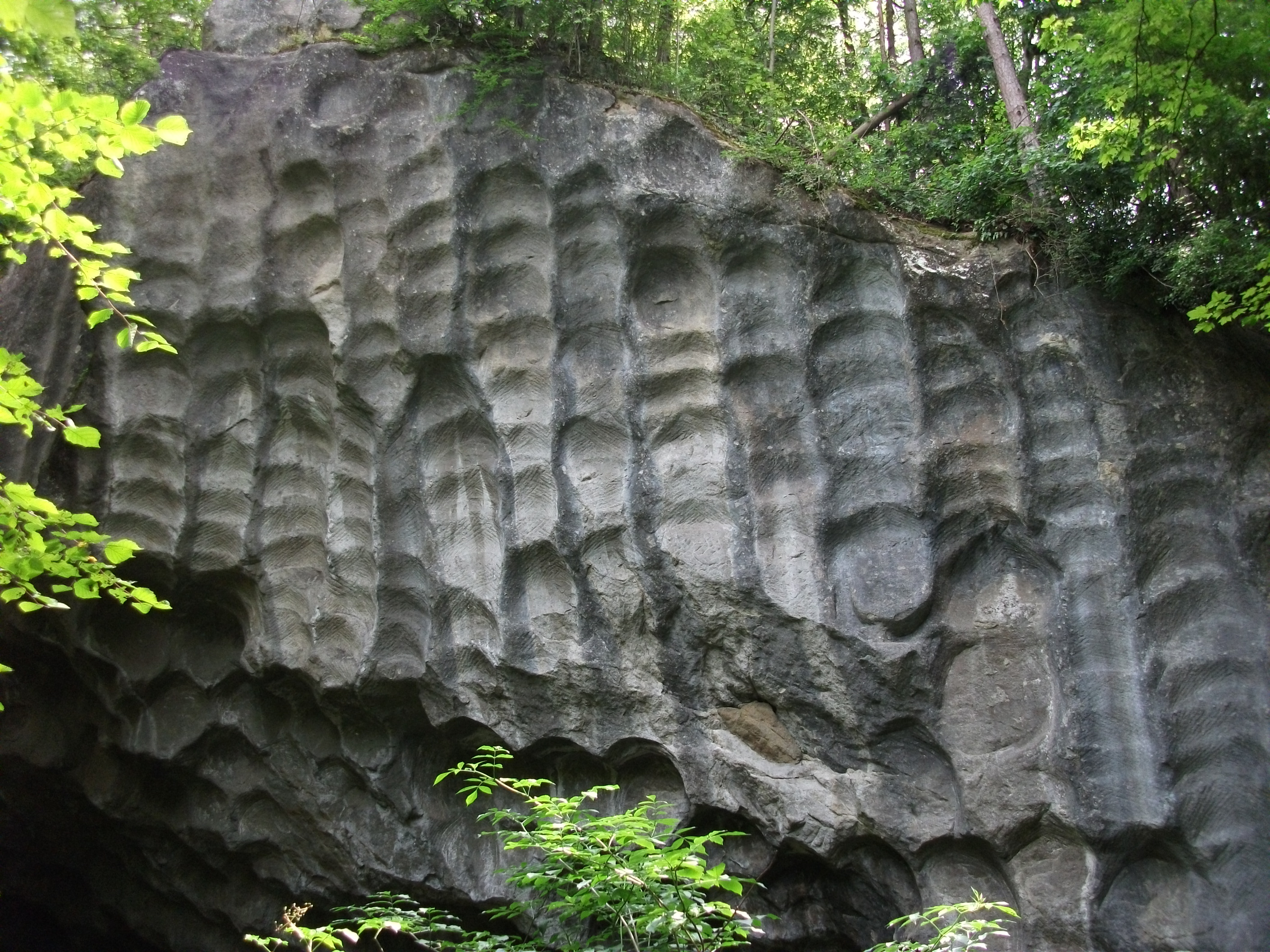 Mühlsteinbruch bei Hinterhör.Früherer Abbauort für Mühlsteine.Geotop im Landkreis Rosenheim